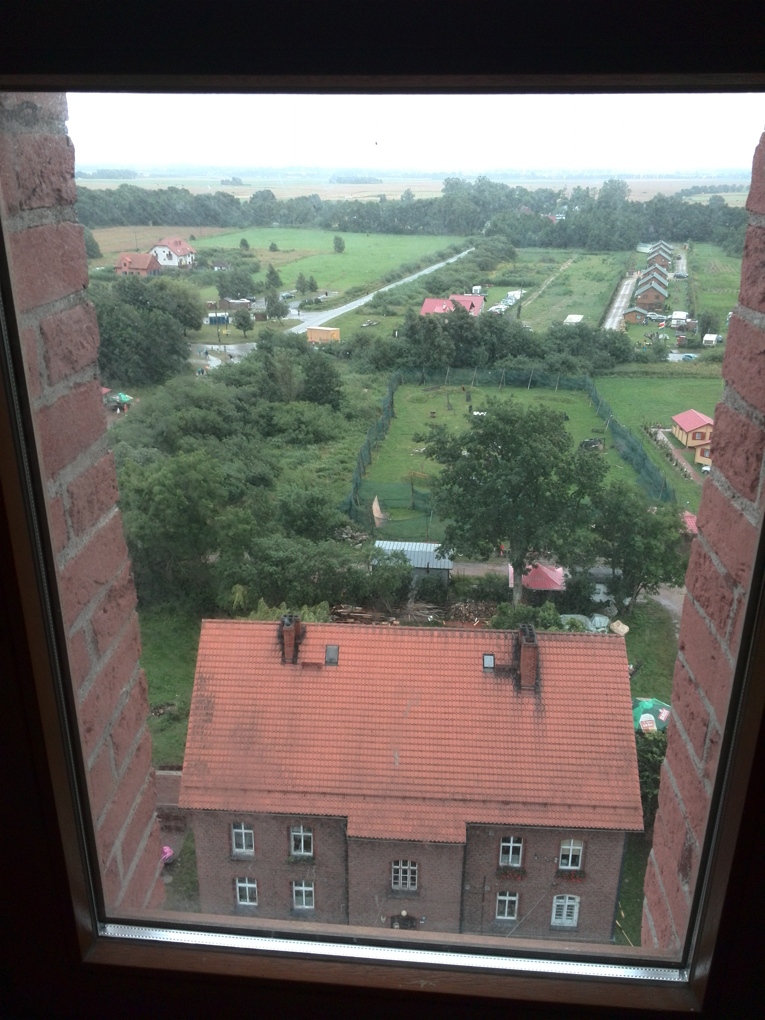 Zdjęcie przedstawia widok z okna wewnątrz Latarni Morskiej Gąski. Zostało wykonane 30 lipca 2015r. o godz. 17:38:45.